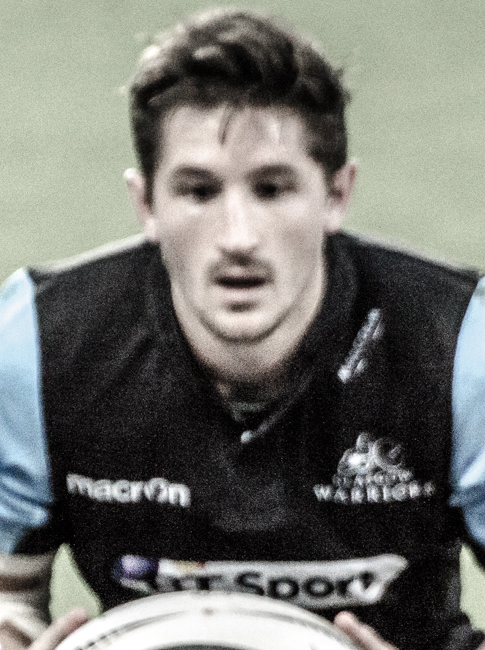 Ulster v Glasgow